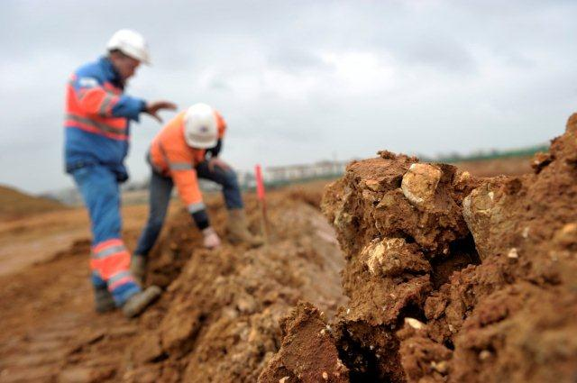 Centre de maintenance du tramway, Havre